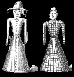 Afbeelding van de stadsreus van Venlo Valuas en zijn vrouw